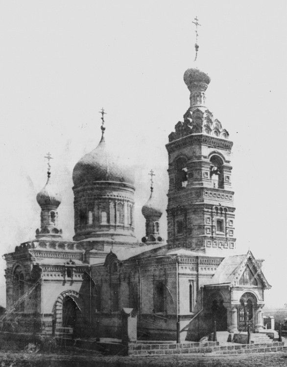 Александровка, ныне район города Ростов-на-Дону. Церковь Сретения Господня